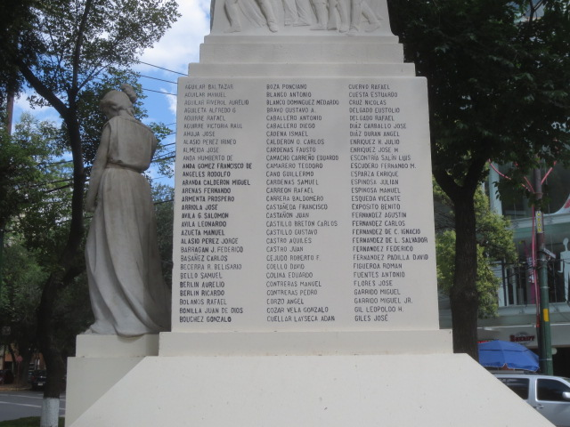 Monumento a "Defensores de Veracruz en 1914" en la ciudad de México, en el cruce de la Avenida Veracruz con la calle de Cuernavaca (cerca de la esquina con la calle de Acapulco).